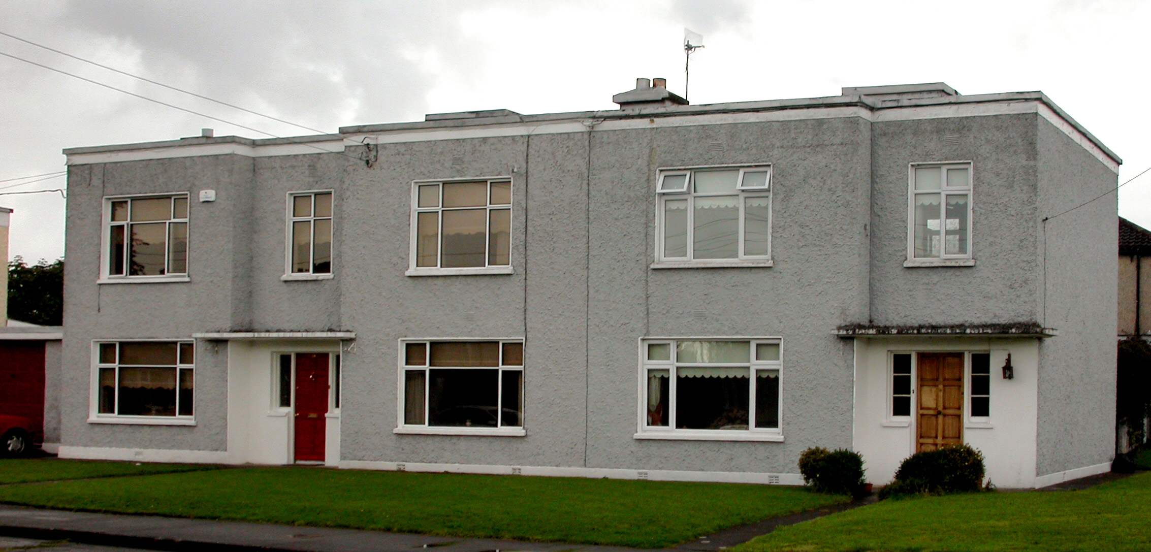 An Eastát Gaelach, Corrbhaile sa bhliain 2007. Tógadh na tithe príobhádacha seo le linn blianta na 1940í agus chuir m/orán bainisteoiri agus teichneoirí Aerfort na Sionna fúthu iontu. Tithe priobhadacha blianta na 1940i, Corrbhaile, Luimneach